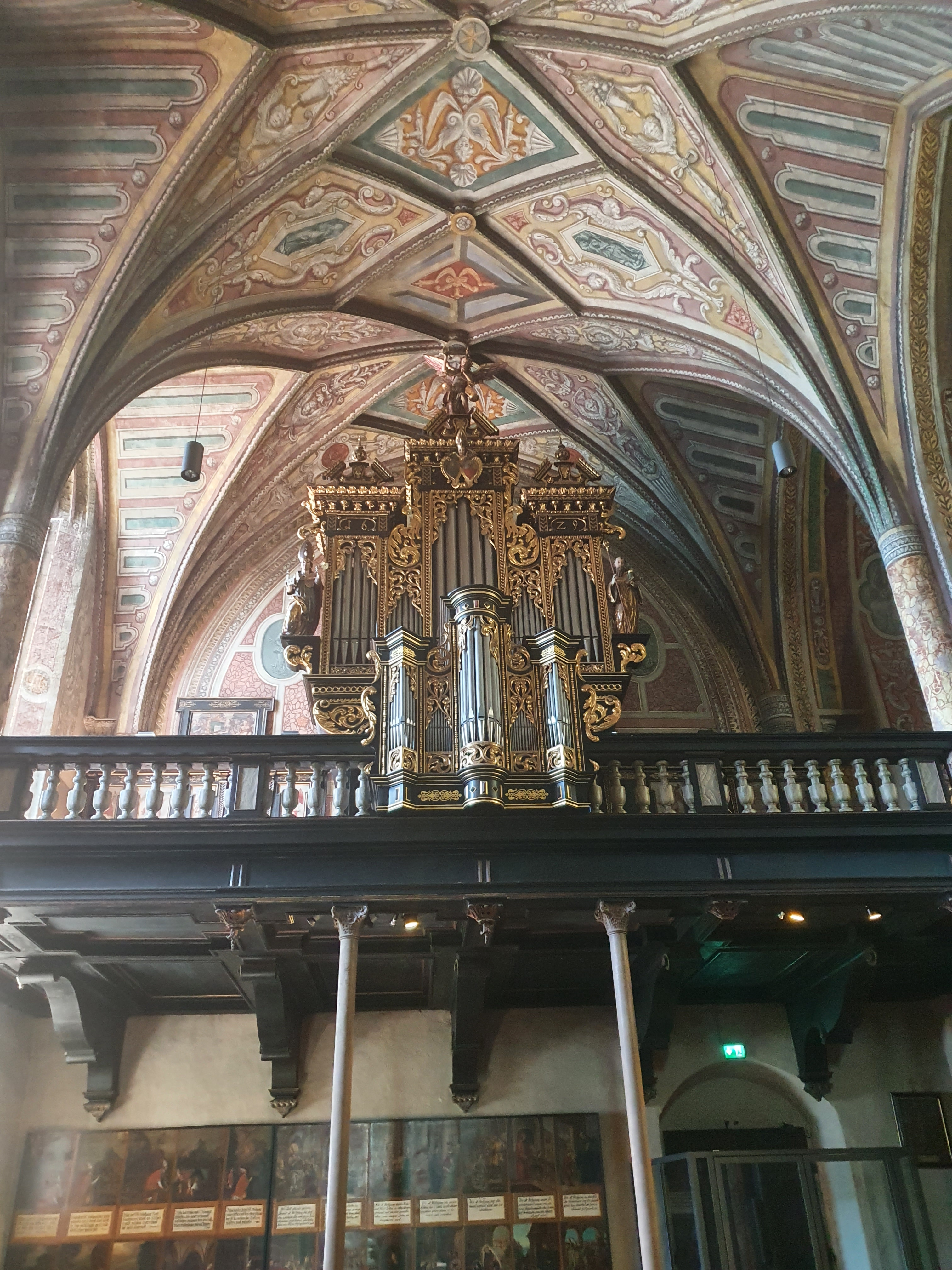 Beckerath-Orgel St. Wolfgang 1980